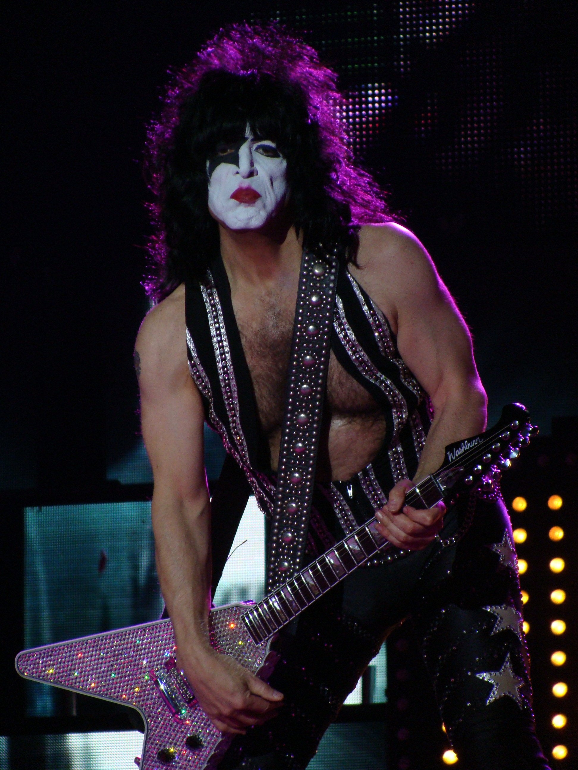 Paul Stanley, en una actuación del grupo KISS en Vitoria-Gasteiz, en el Azkena Rock Festival.